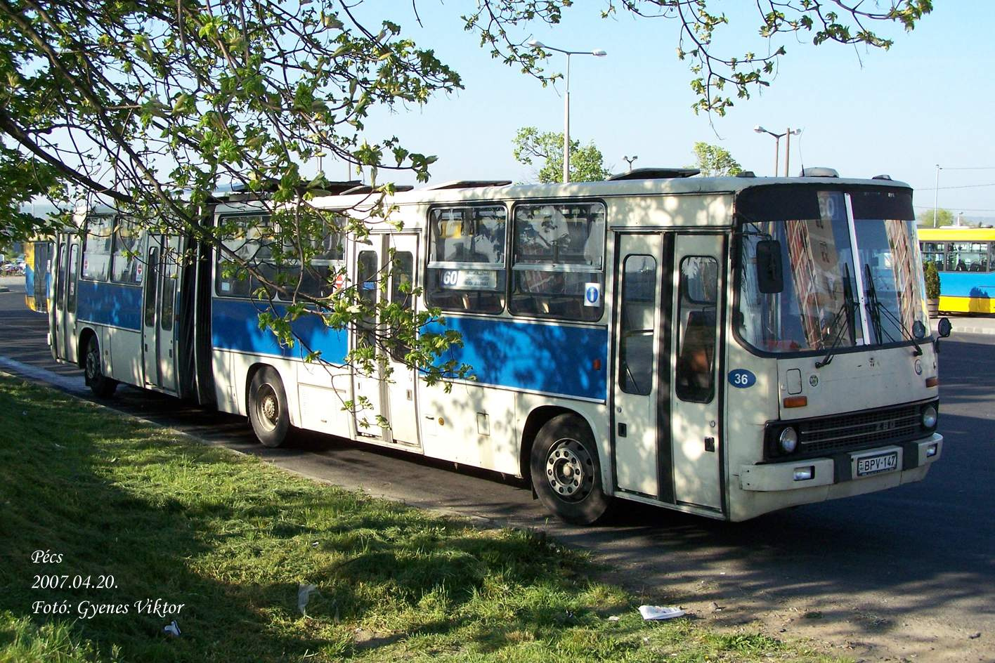 Ikarus 280-as Pécsett a 60-as vonalon